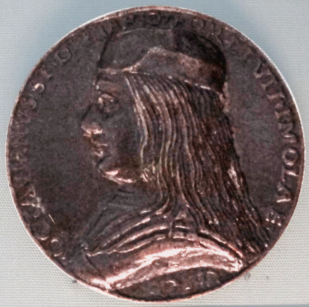 Medaglia di ottaviano sforza-riario, 1490 ca.